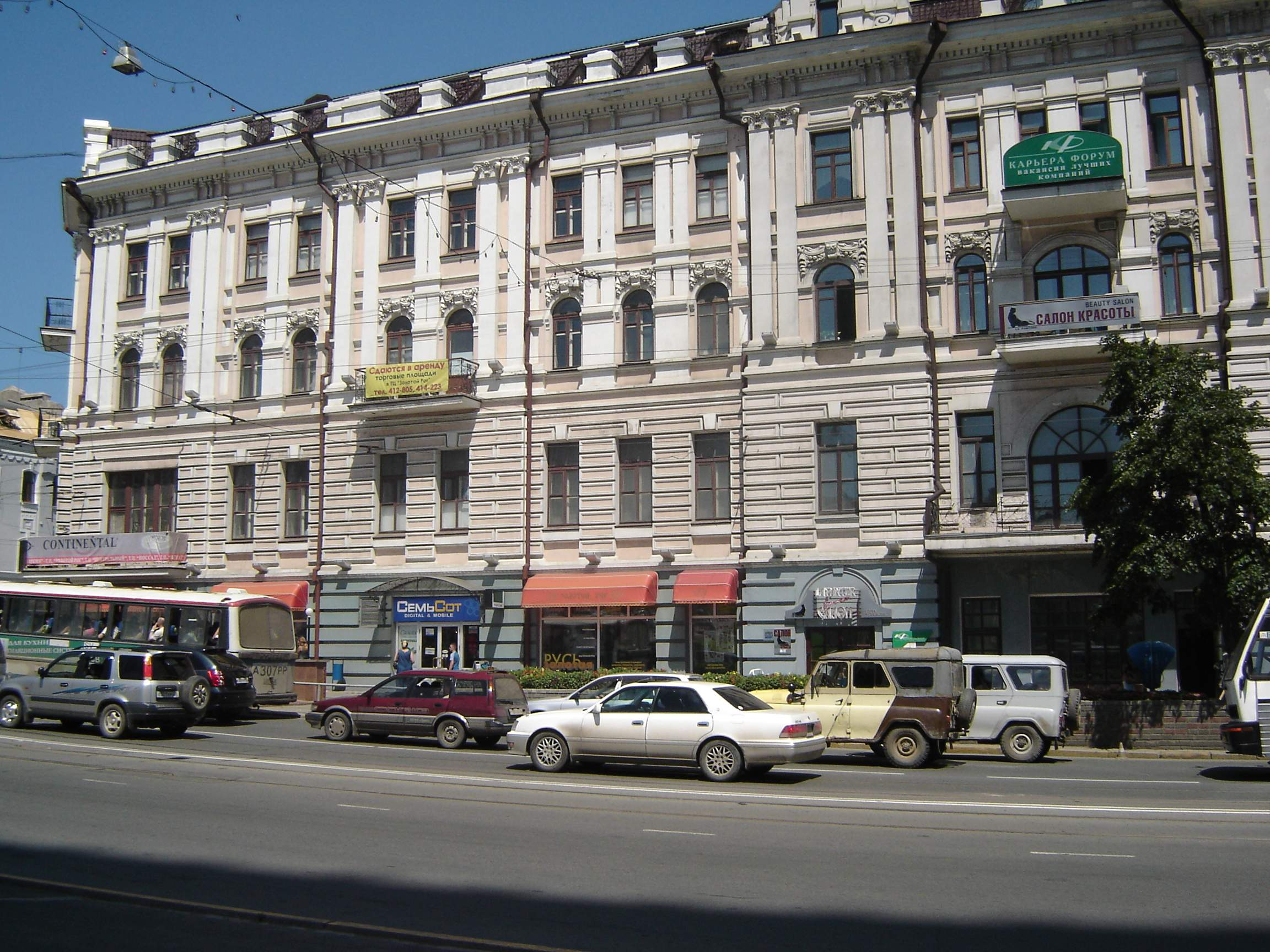 Владивосток, Светланская, 13, 2005-08-15